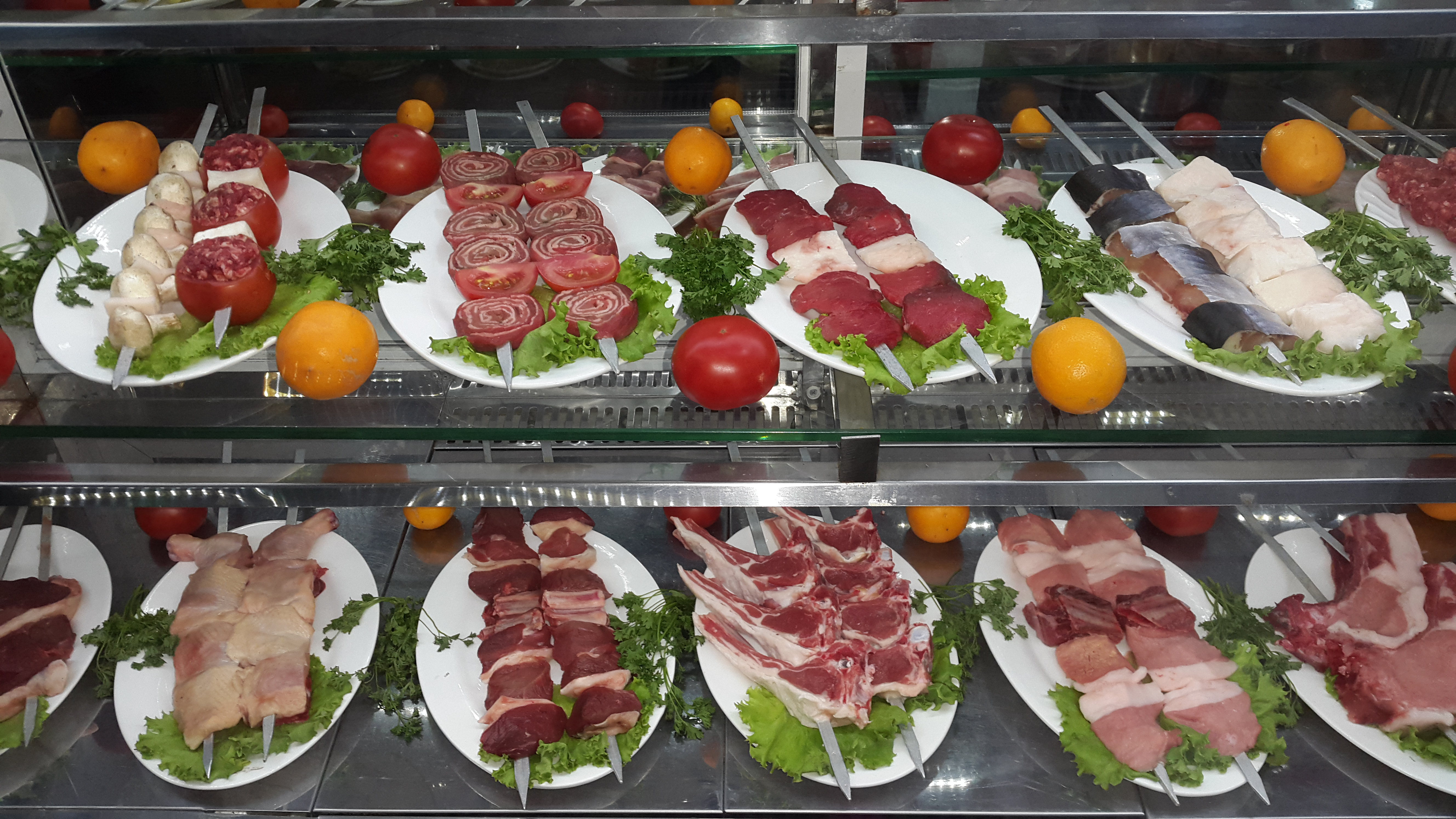 Различные мясные полуфабрикаты для приготовление барбекю